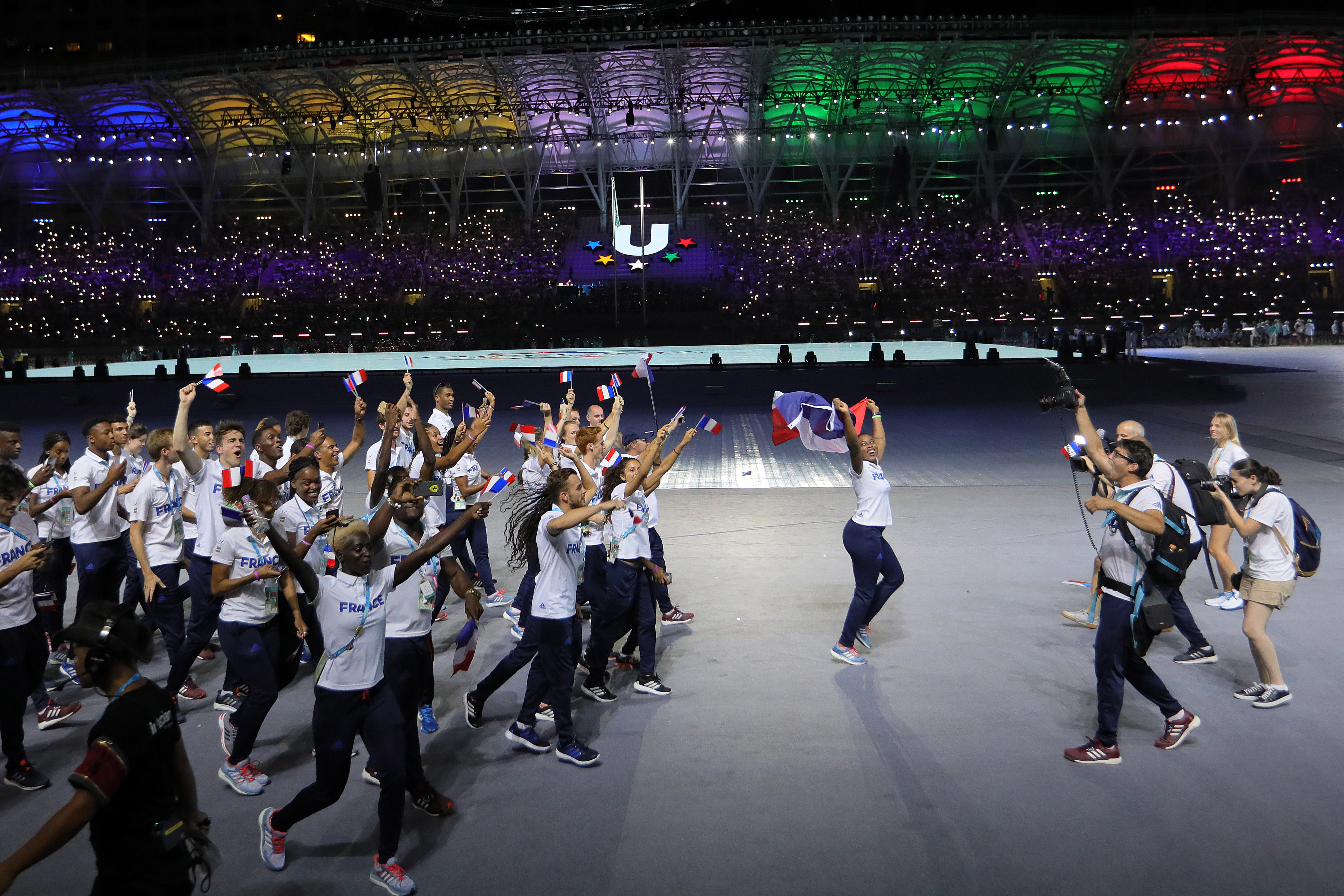 2017年世界大學運動會開幕典禮，法國選手代表進場